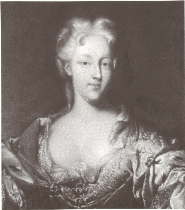 Christiane Charlotte von Württemberg, Frau von Wilhelm Friedrich